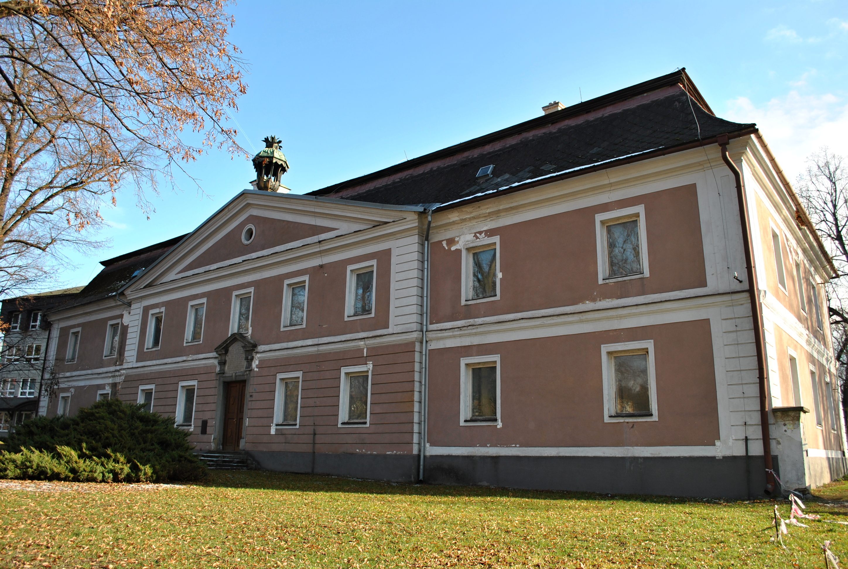 Škola